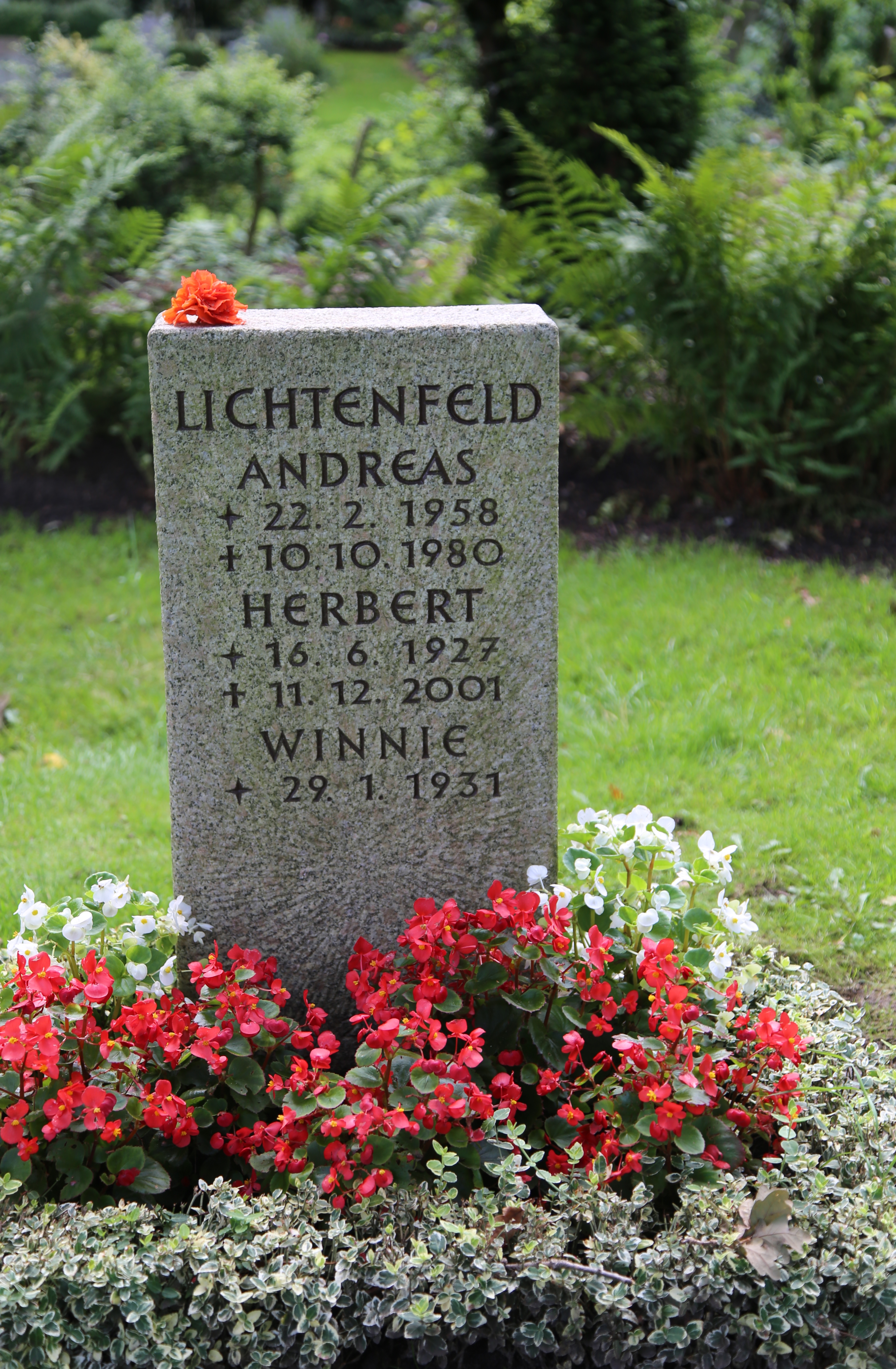 Herbert Lichtenfeld (* 16. Juni 1927 in Leipzig; † 11. Dezember 2001 in Hamburg) war einer der erfolgreichsten Fernsehautoren in Deutschland. Er schrieb nach eigenen Angaben insgesamt 300 Drehbücher. Viele seiner von ihm verfassten Serien, Episoden und Spielfilme wurden große Erfolge.